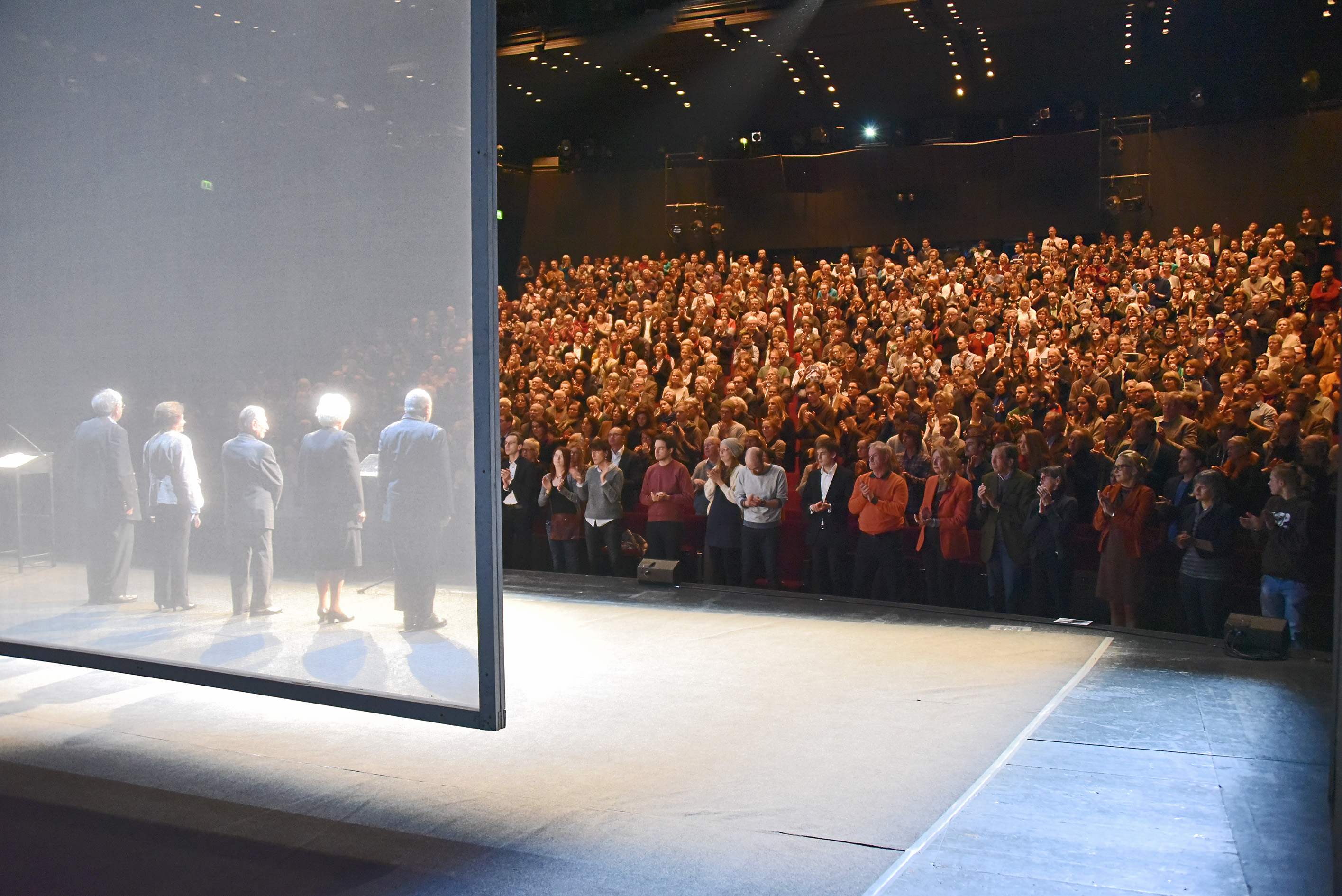 Die letzten Zeugen, eine Produktion des Wiener Burgtheaters auf Gastspiel beim Schauspiel Frankfurt, Schlussapplaus